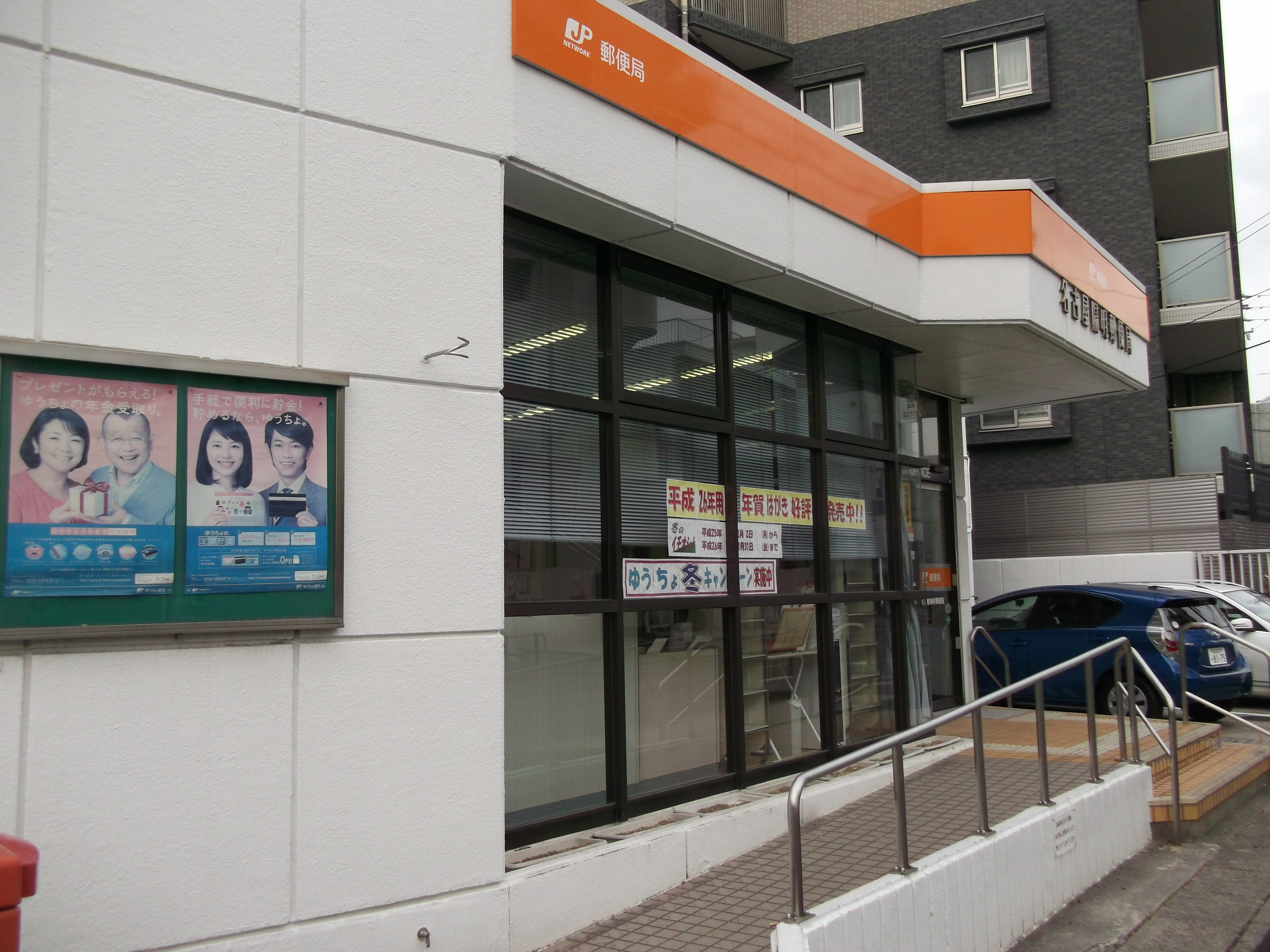 名古屋市瑞穂区陽明町にある名古屋陽明郵便局を南側から写す